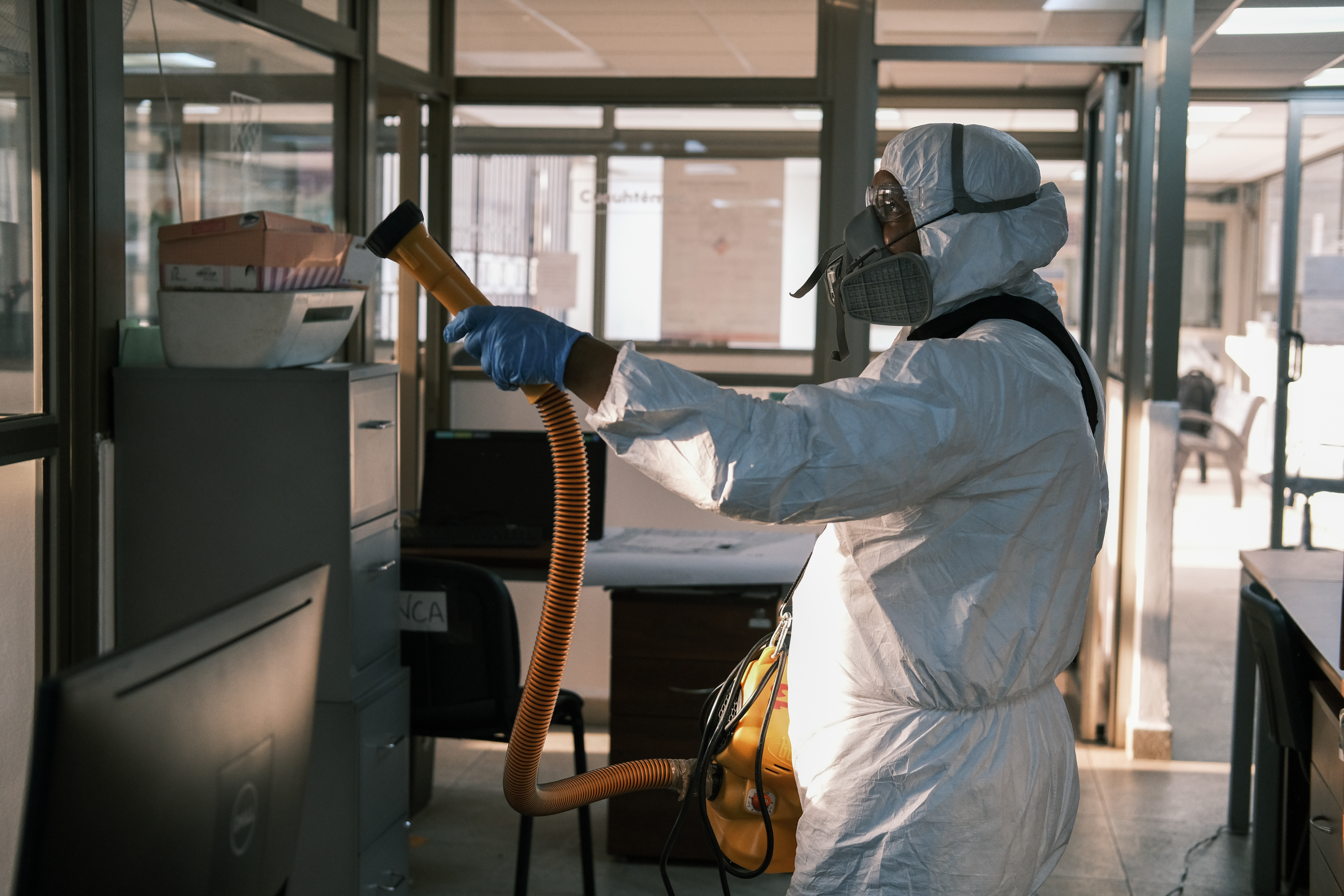 Debido a la emergencia mundial provocada por el virus COVID-19, los edificios públicos de la Ciudad de México toman medidas sanitarias extraordinarias para disminuir el riesgo de contagio entre los trabajadores que deben continuar asistiendo al centro laboral. En la gráfica, un trabajador de una empresa privada, aplica un compuesto químico que reduce el número de microorganismos.